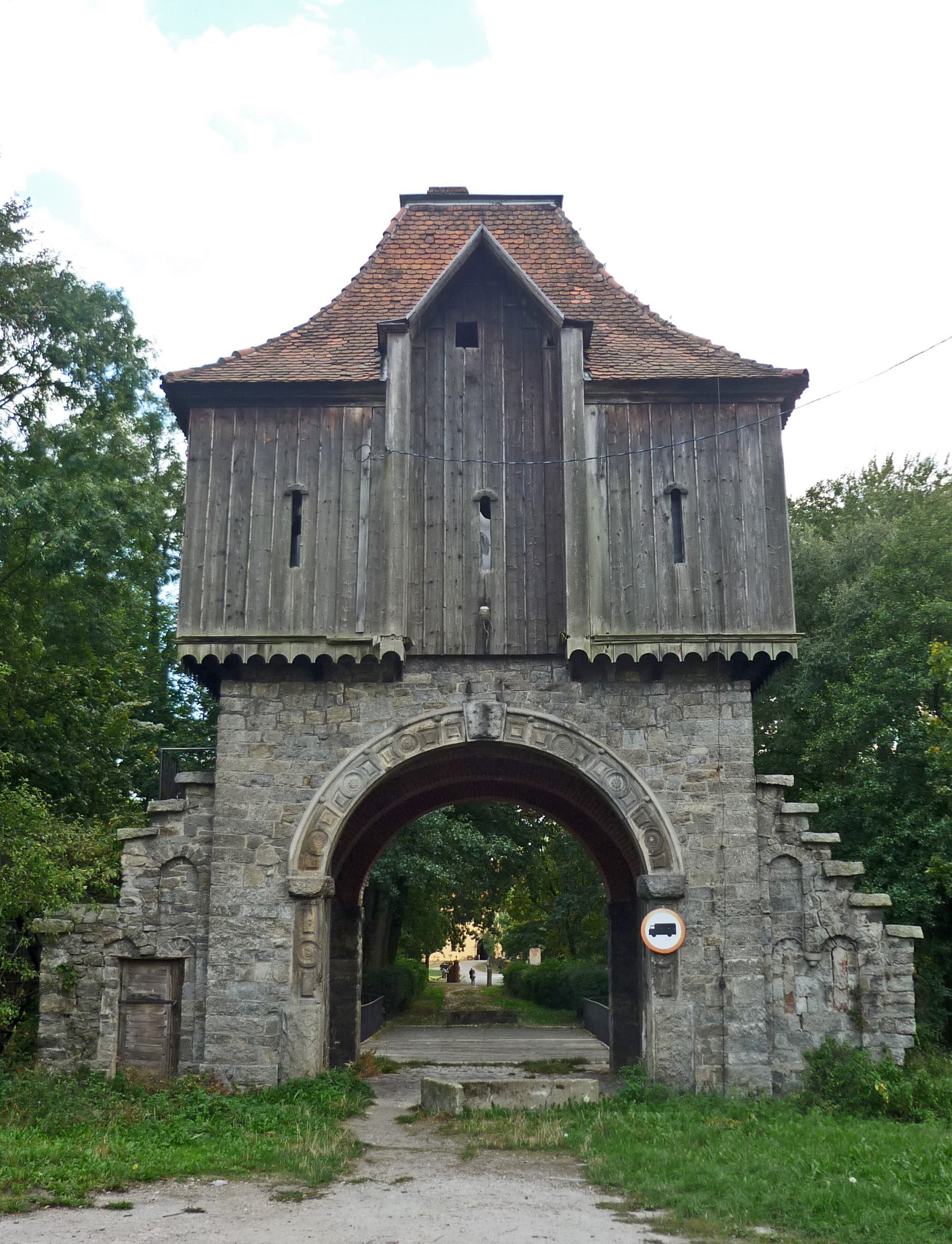 Krobielowice - budynek bramny, 1878